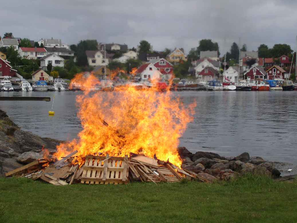 St Hans bål på Buøy